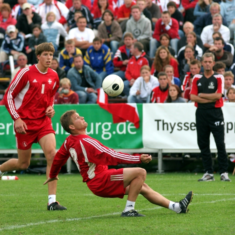 Faustball-Zuspiel durch Marcel Stoffel (mitte) für Cyrill Schreiber (links) (Schweiz)